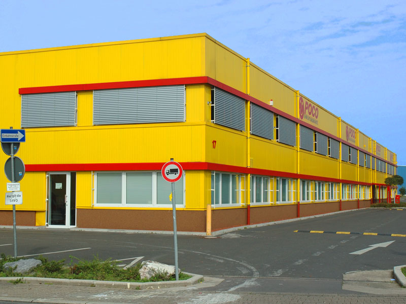 Germany Bergkamen Schering Areal